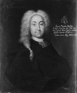 Gemälde in der Professorengalerie Tübingen